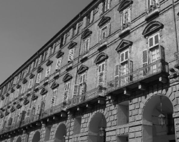 Palazzo delle Regie Segreterie di Stato, a Torino.